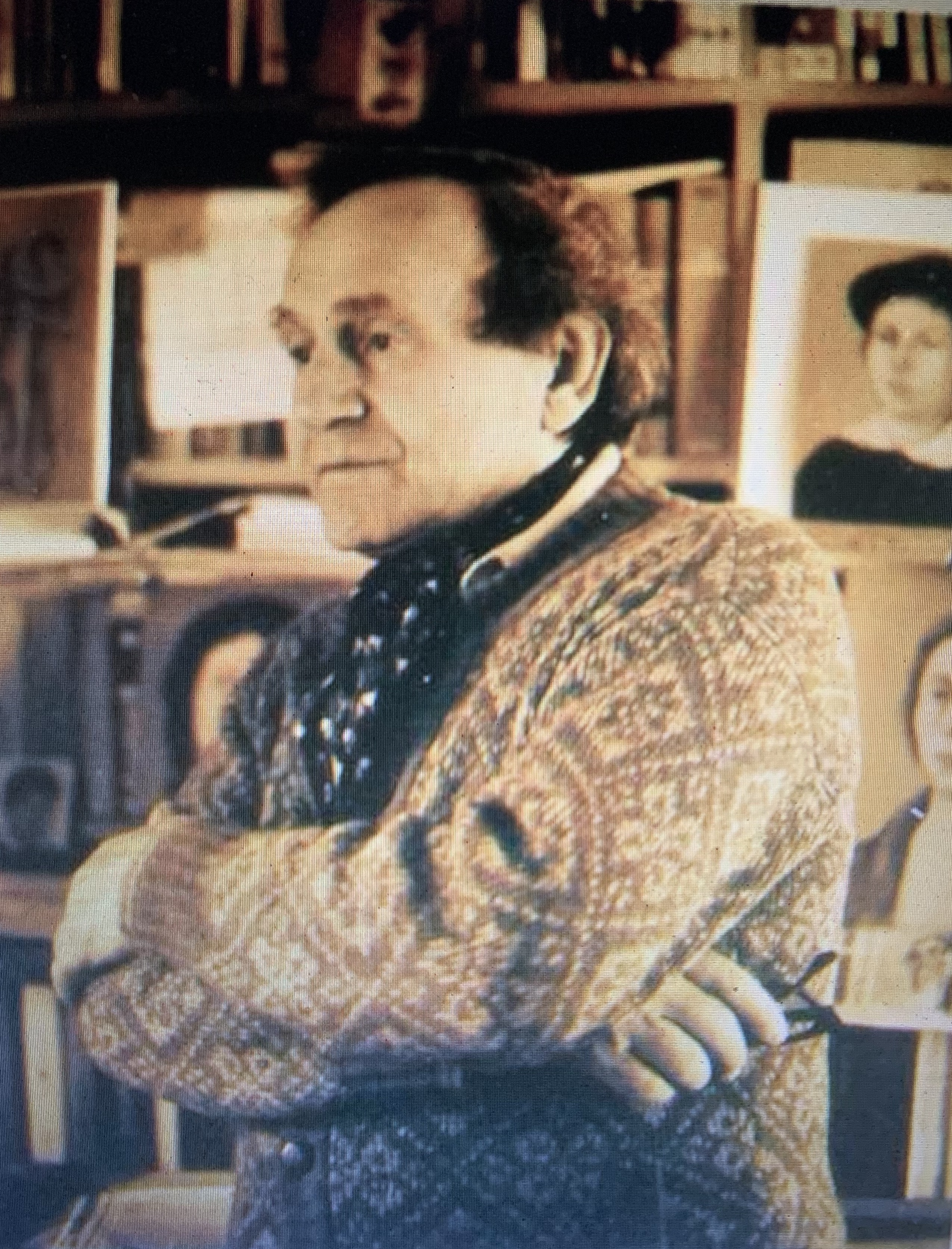 Renzo Marcato 3